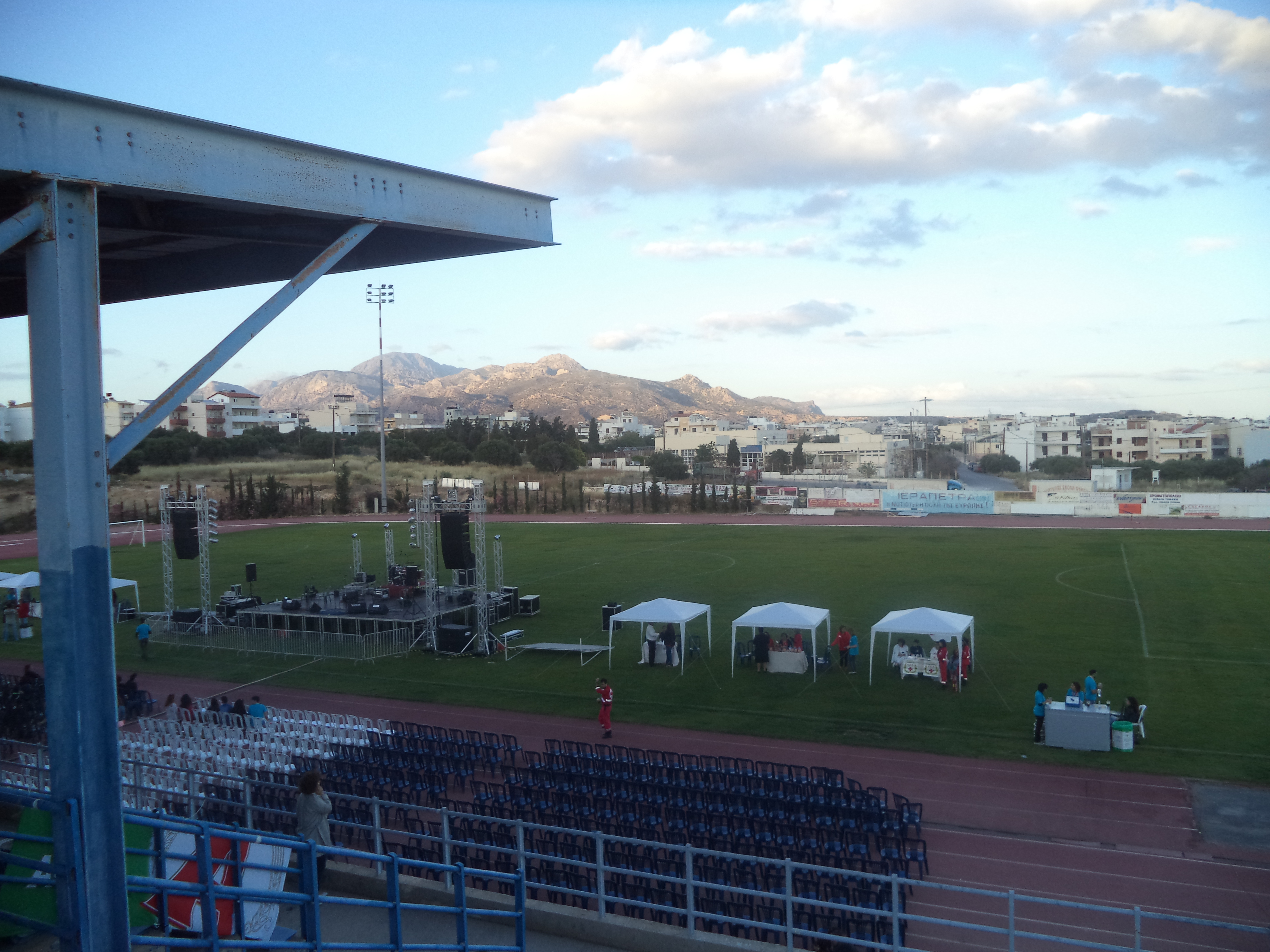 Το Βουζουνεράκειο Στάδιο στις 17/5/2014, λίγο πριν την έναρξη της συναυλίας Σκουλά-Χαρούλη-Τζουανάκη.